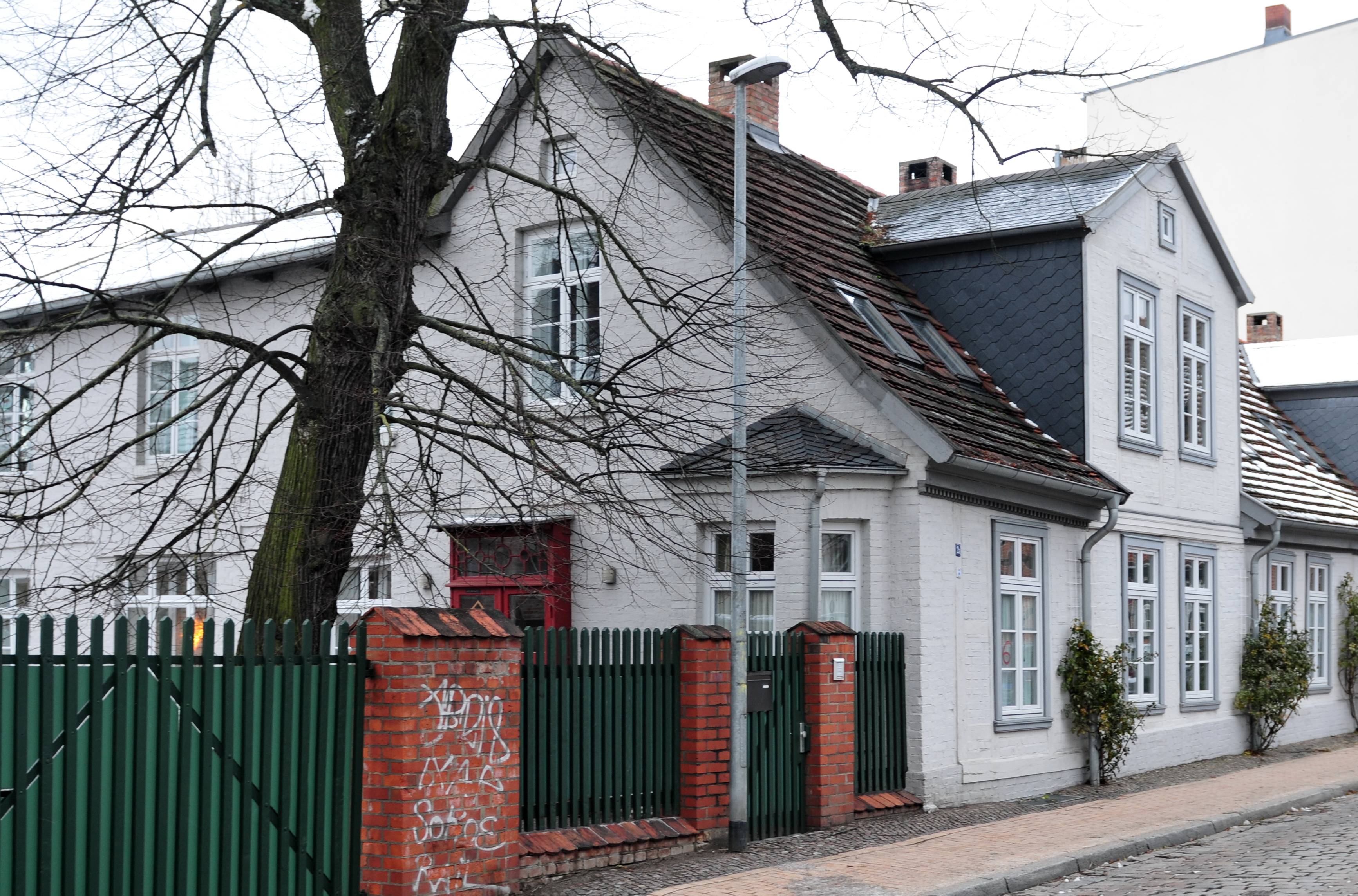 Denkmalgeschütztes Wohnhaus (Fachwerkhaus) Schweinemarkt 2a in Schwerin, Mecklenburg-Vorpommern